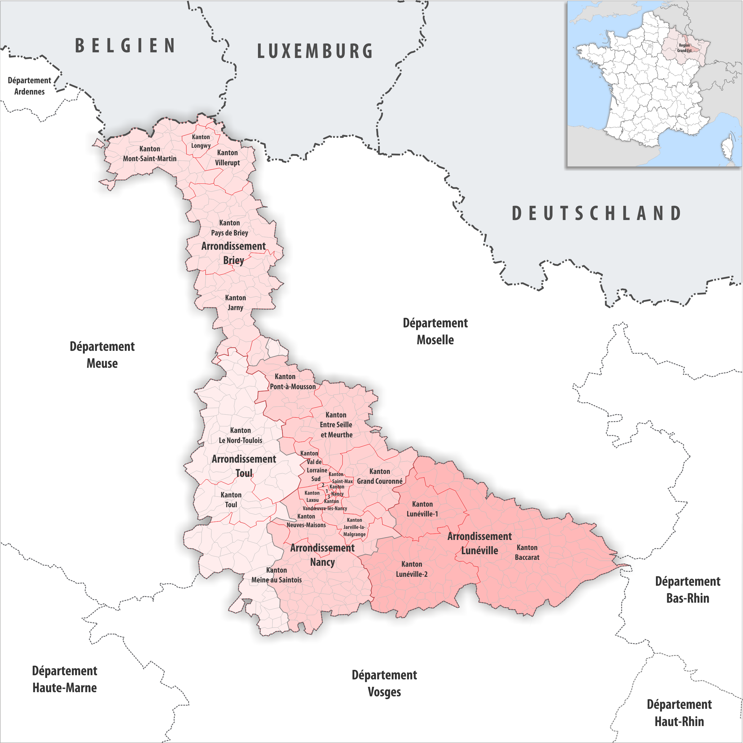 Gemeinden, Kantone und Arrondissemente im Departement Meurthe-et-Moselle